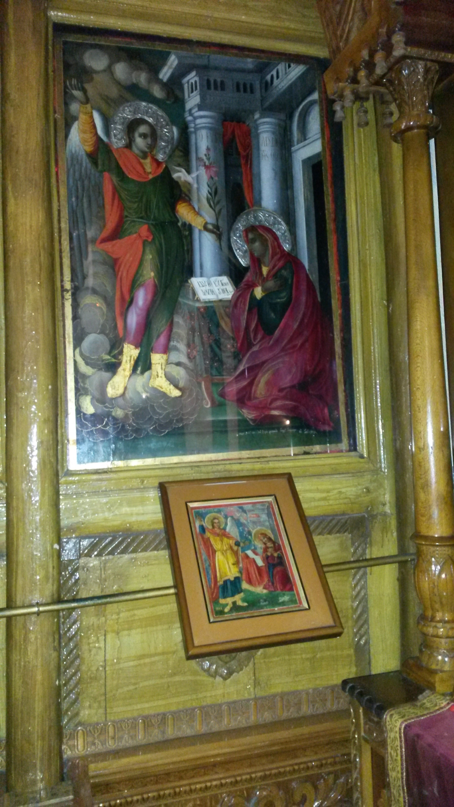 Ευαγγελισμός της Θεοτόκου.